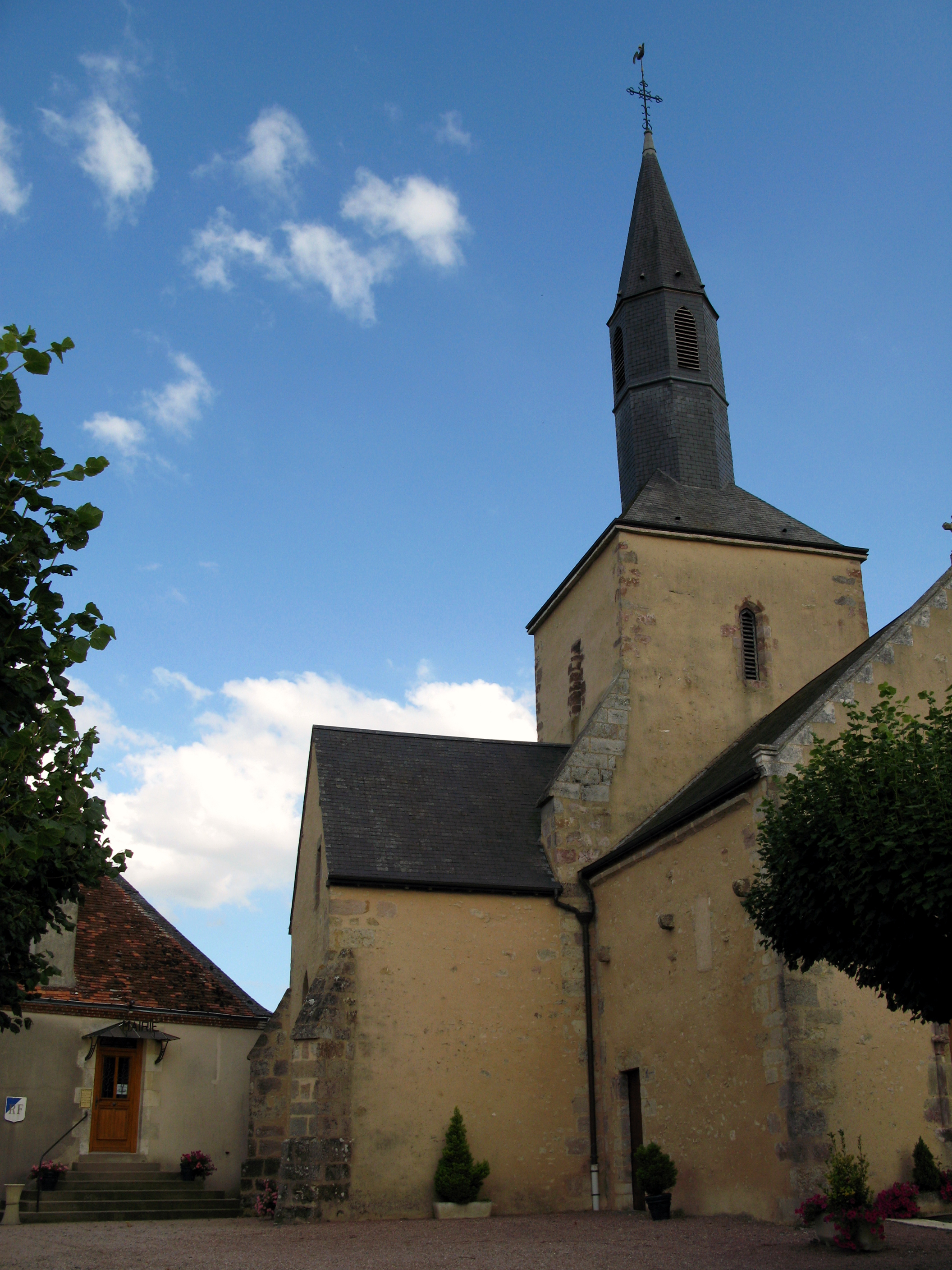 Mouhers (Indre, France) - L'église et la mairie. . . .